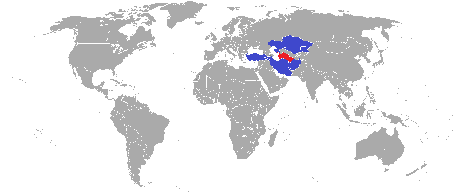 Карта консульств Туркменистана